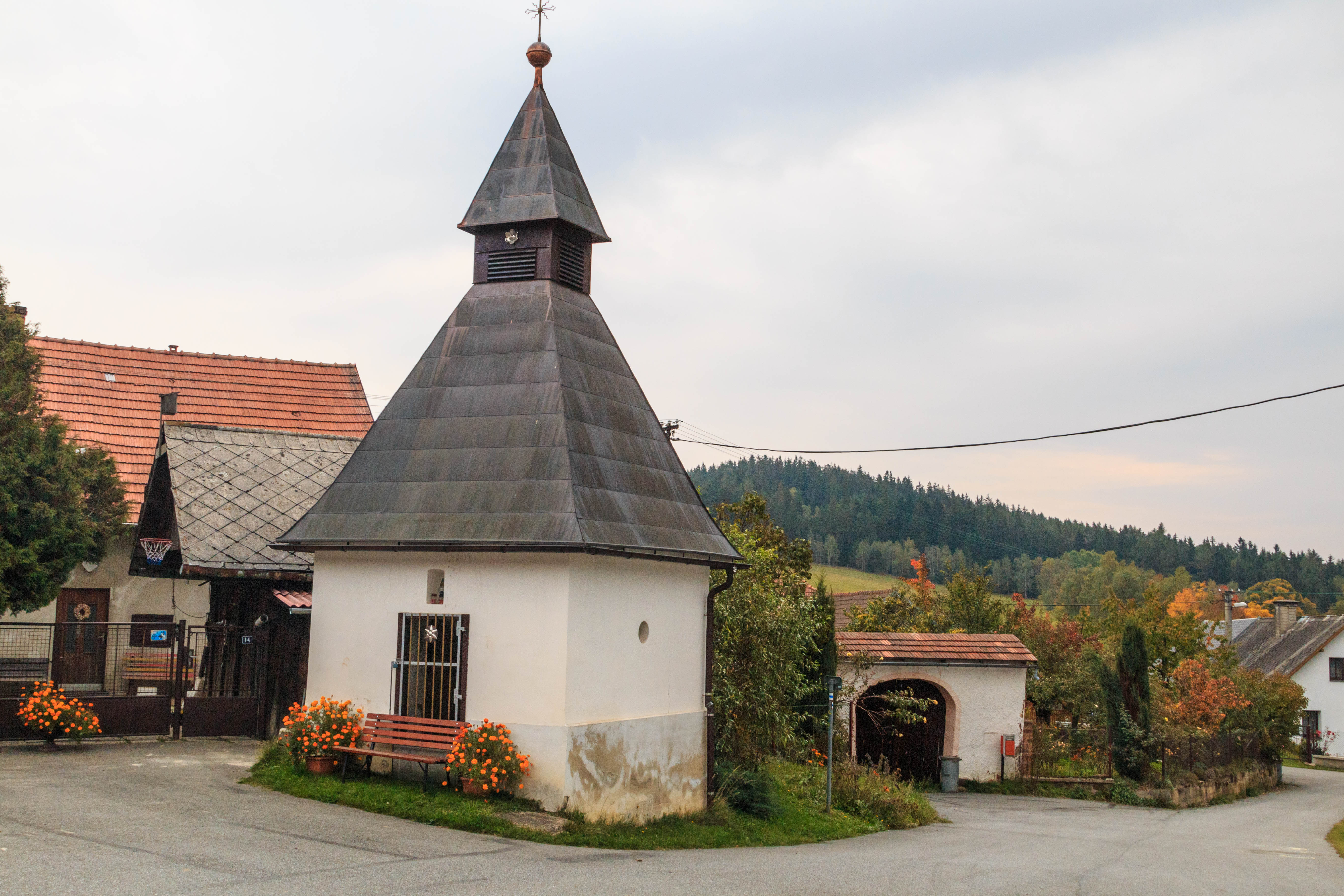 Mojkov - kaple